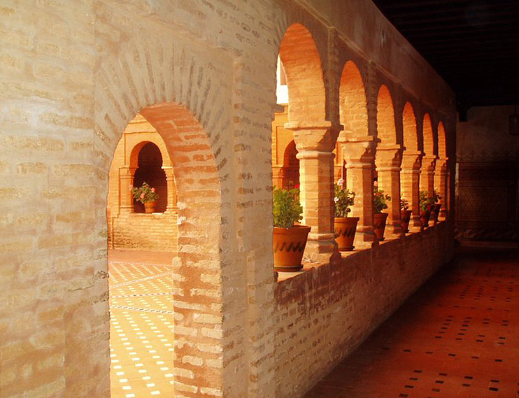 Claustro mudéjar en La Rábida, provincia de Huelva, España.